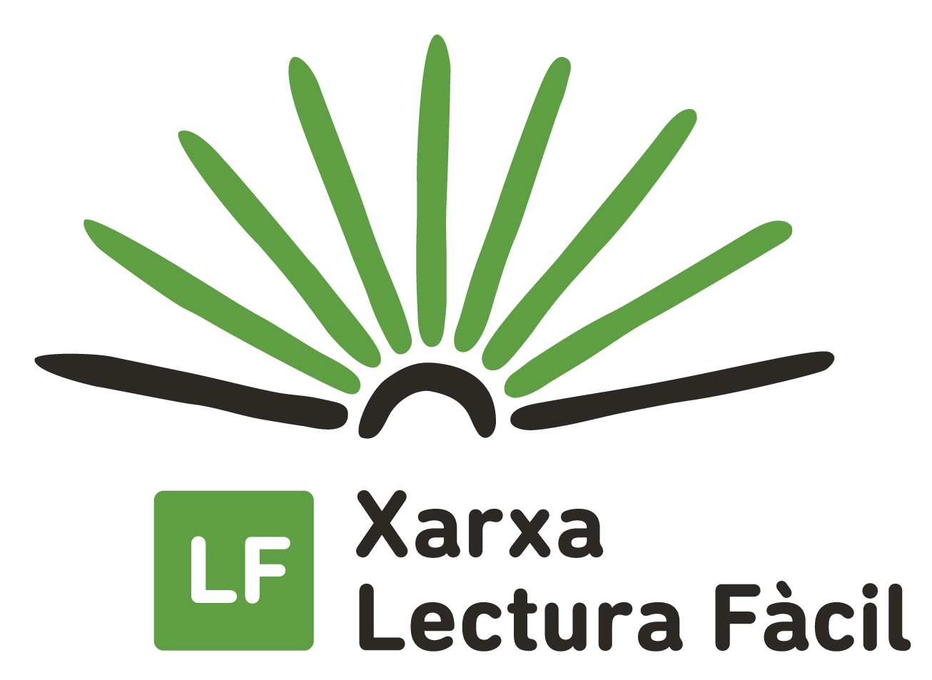 Xarxa Lectura Fàcil